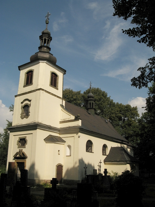 Kostel svaté Kateřiny, Kunčice, Kunčice (Letohrad).